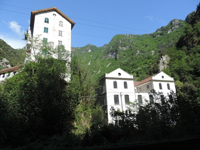 vista frontale della Filanda di Forno nel 2017